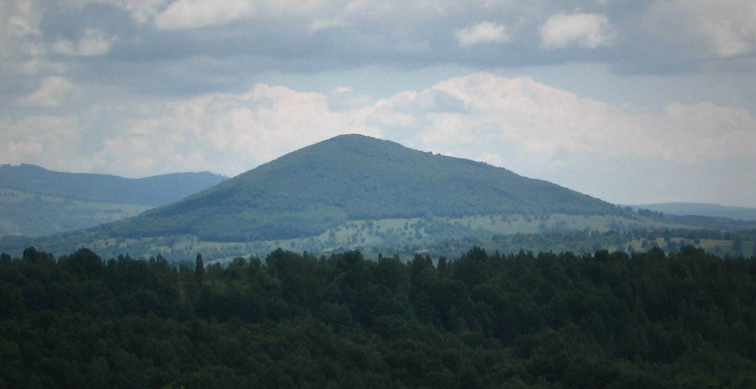 A Nagy-Murgó (1016 m) a Déli-Hargitában, északról (Erdély)